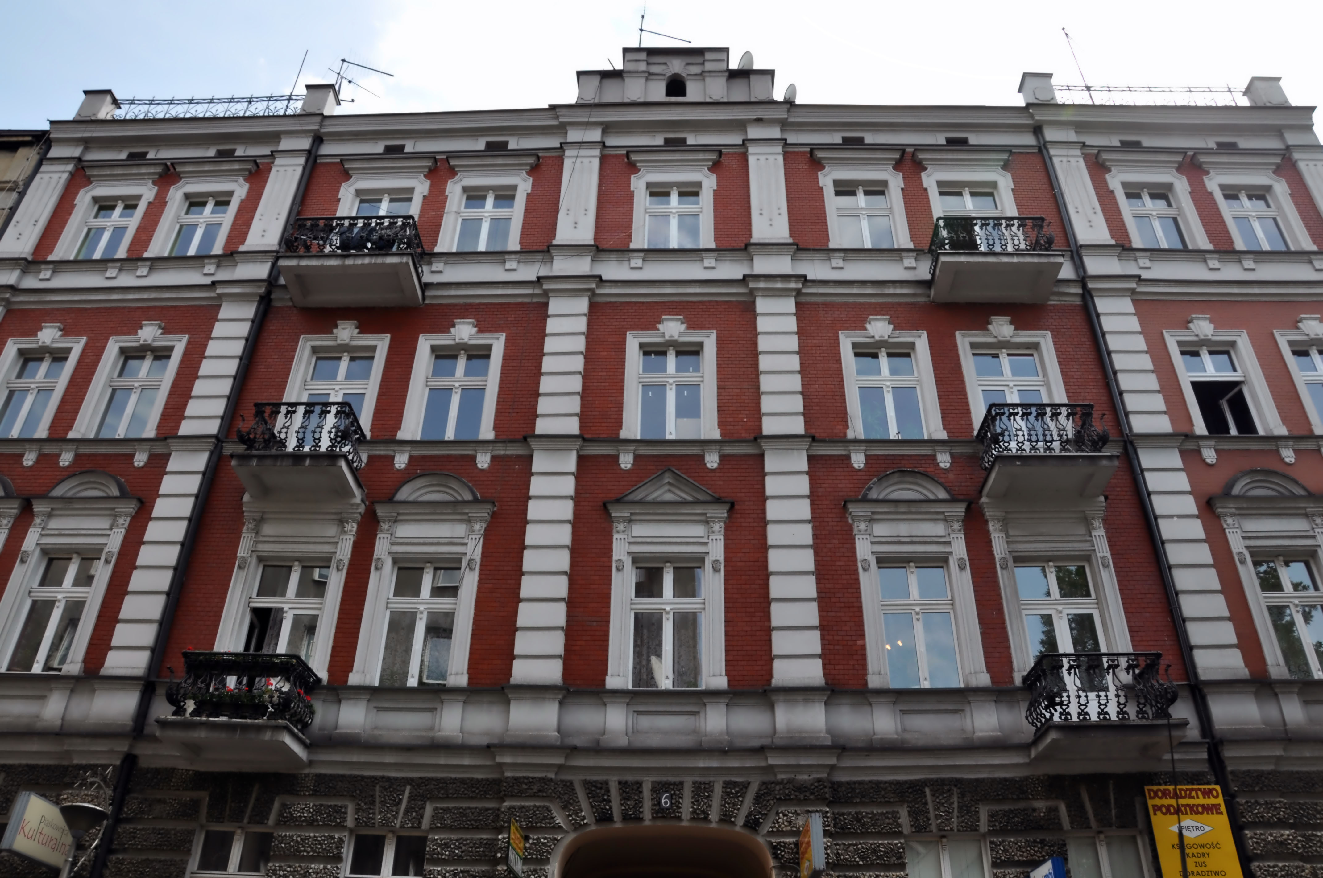 Sosnowiec, ul. Dekerta 6 - kamienica (zabytek nr A/1360/88 z 8 II 1988)